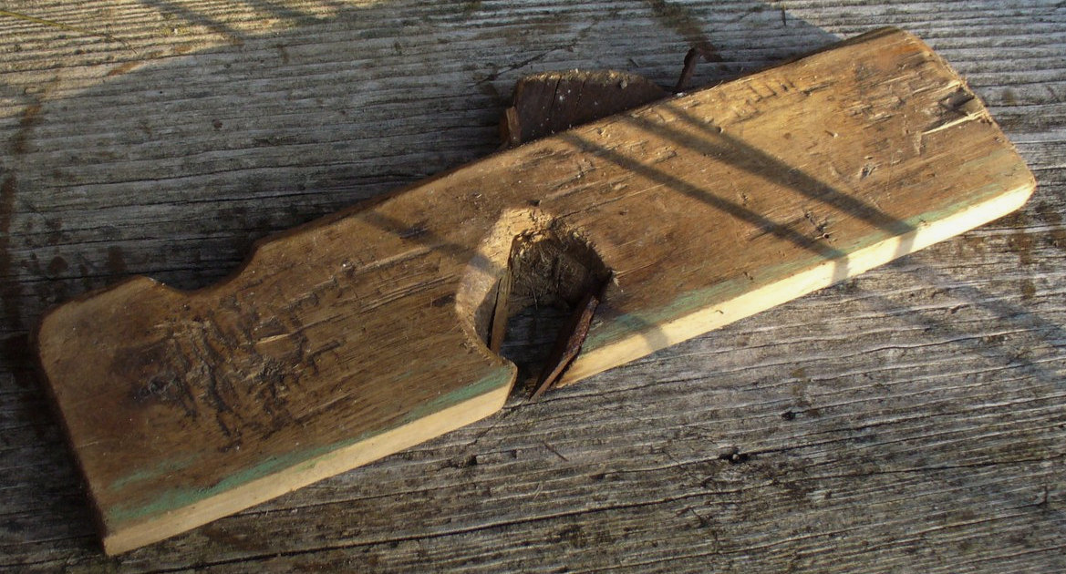 Зензубель. самодельный.